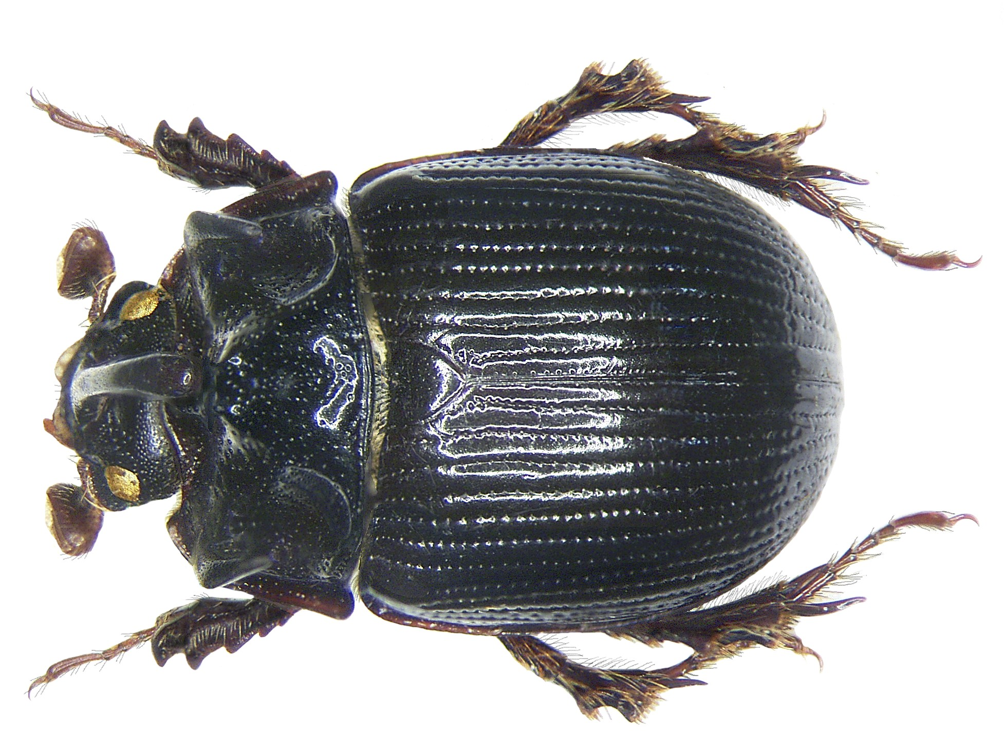 Familie: Scarabaeidae Grösse: 7-10 mm Verbreitung: Europa Fundort: Germania, Bayern, Dornheim leg. U.Eitschberger, 1966; det. U.Schmidt Foto: U.Schmidt, 2007